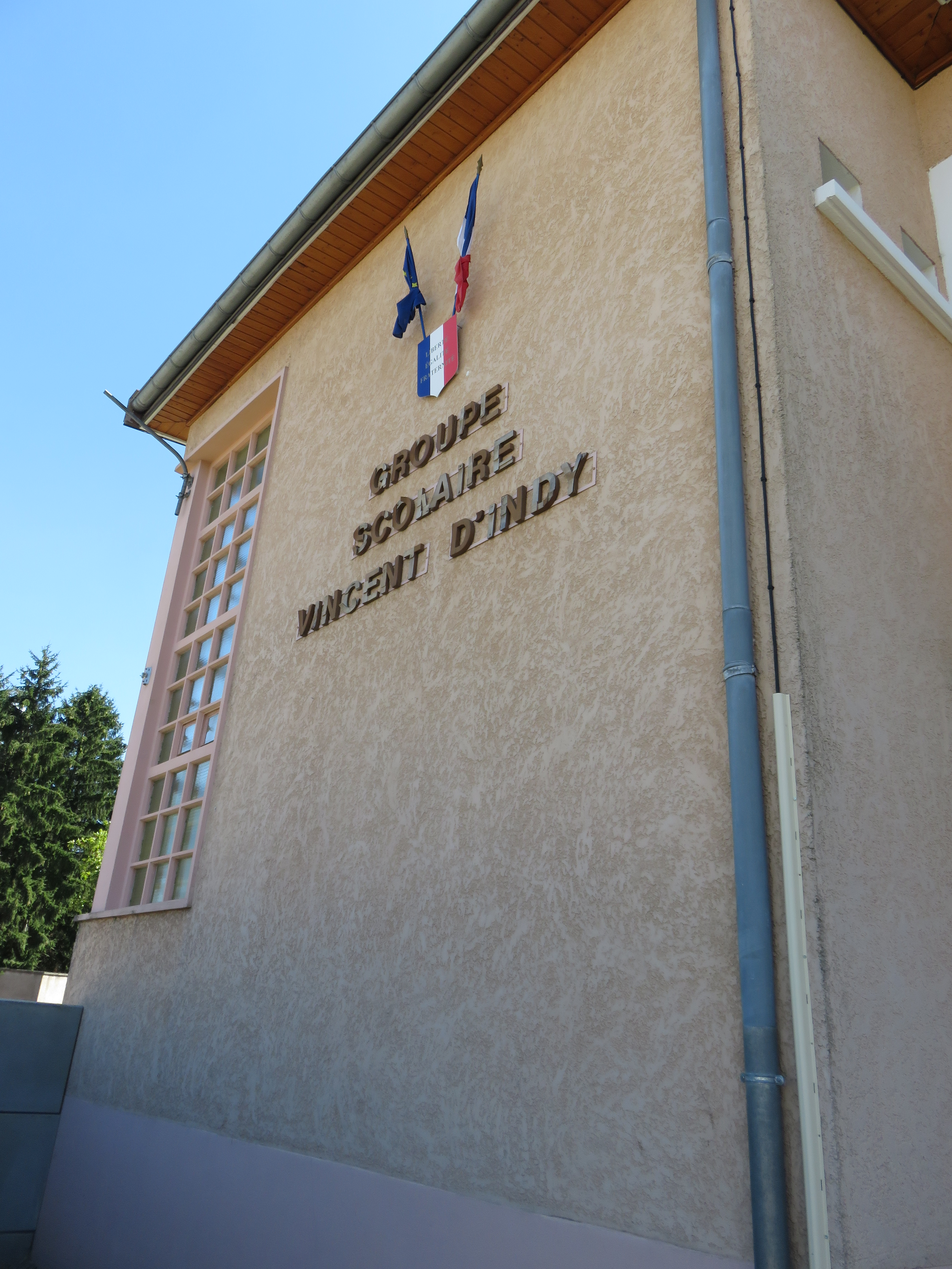 Bâtiment du groupe scolaire Vincent d'Indy à Saint-Laurent-de-Mure (Rhône, France).